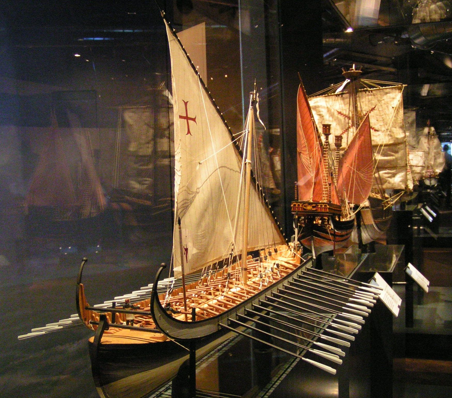 Ship models at "Deutsches Technikmuseum", Berlin, Germany